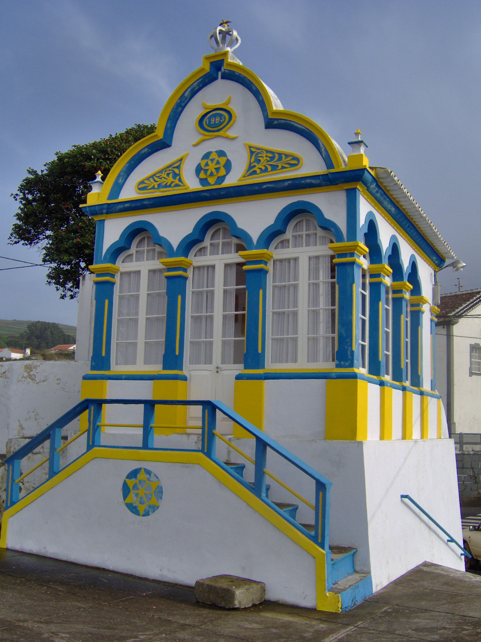 Império do Espírito Santo das Quatro Ribeiras, Praia da Vitória, ilha Terceira, Açores